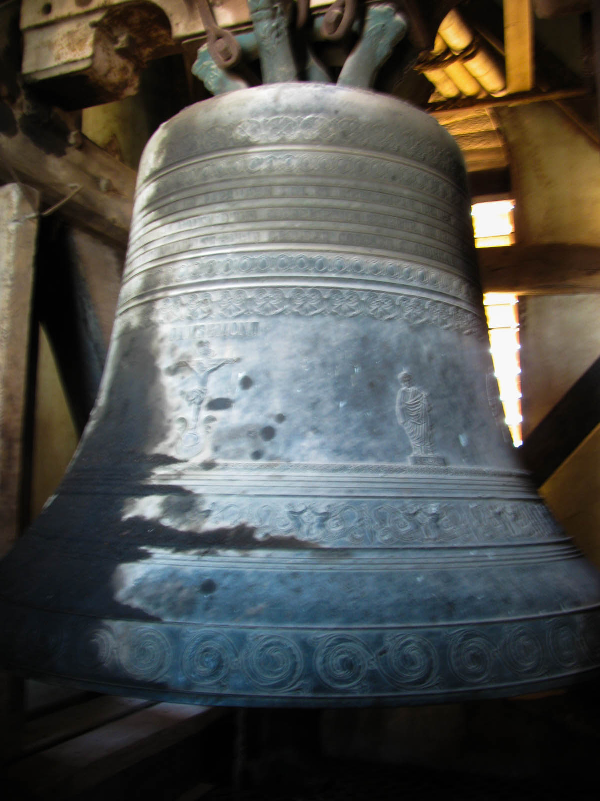 Quả chuông nặng hơn 2000 kg ở nhà thờ sở kiện, Thanh Liêm, Hà Nam